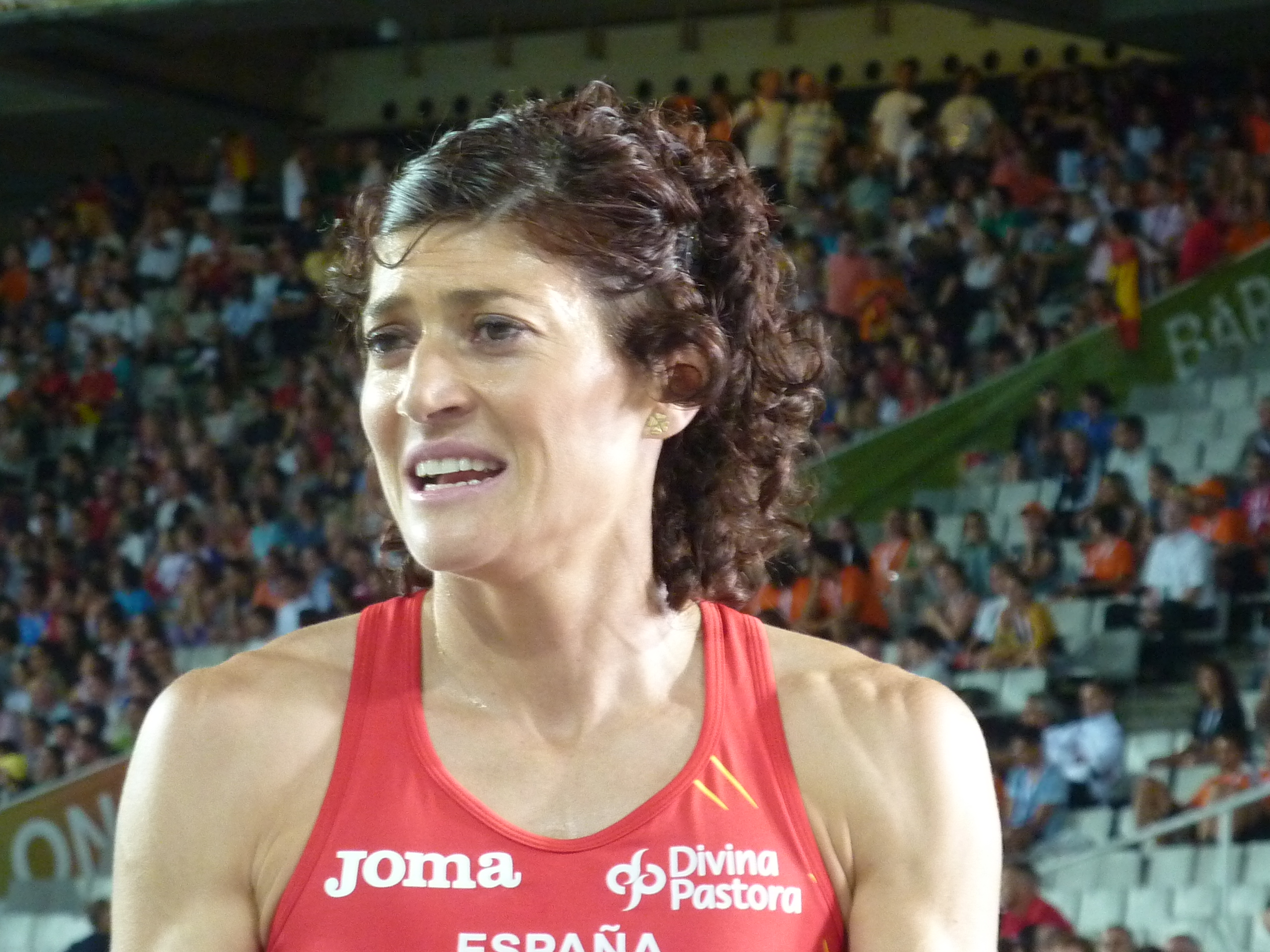 Mayte MartÃ­nez